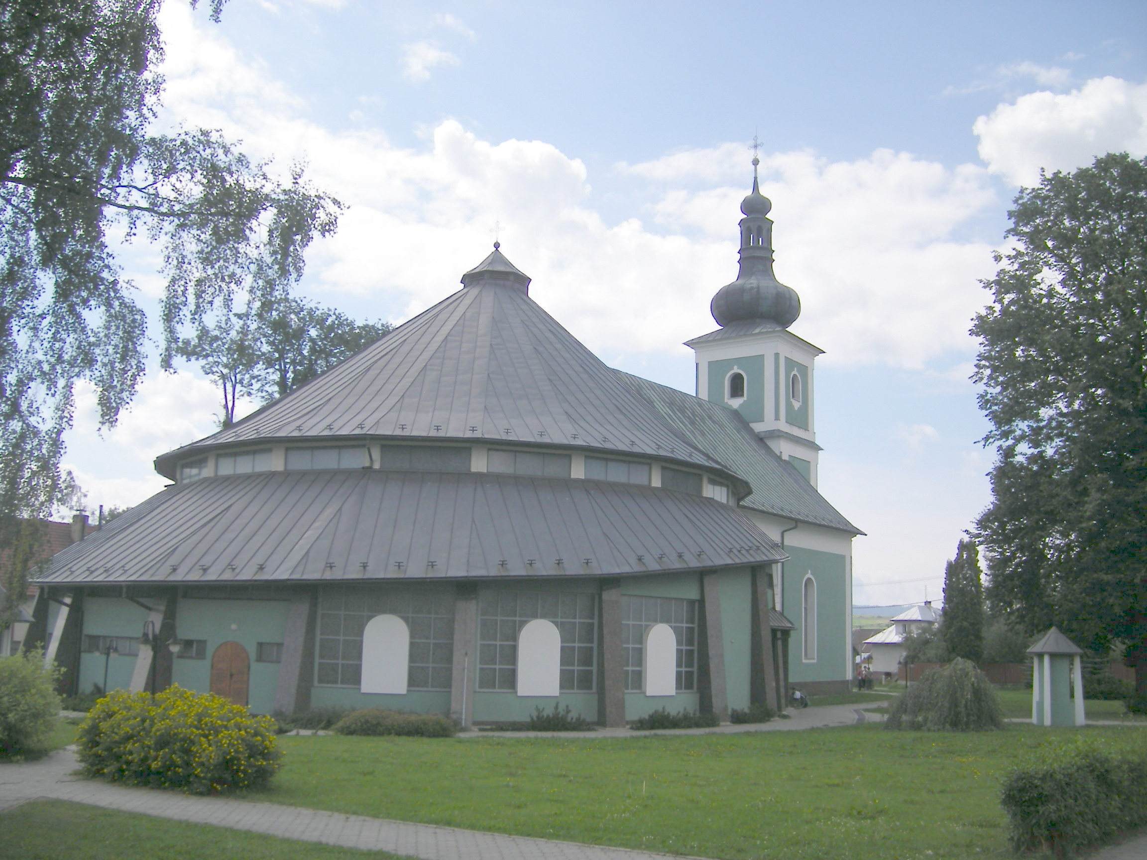 Liesek (okres Tvrdošín)